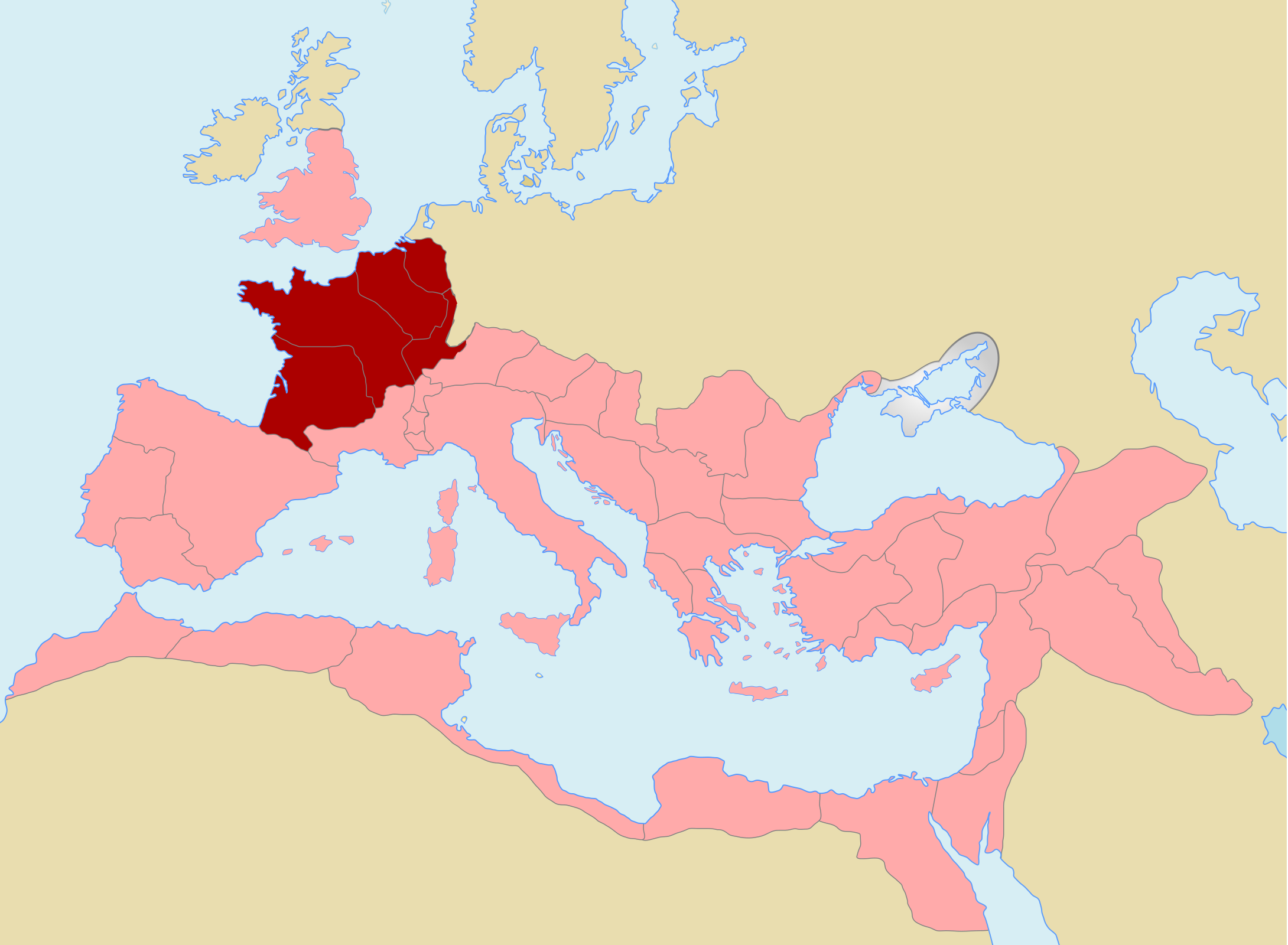 La Gallia Comata in rosso all'interno dei confini dell'impero romano